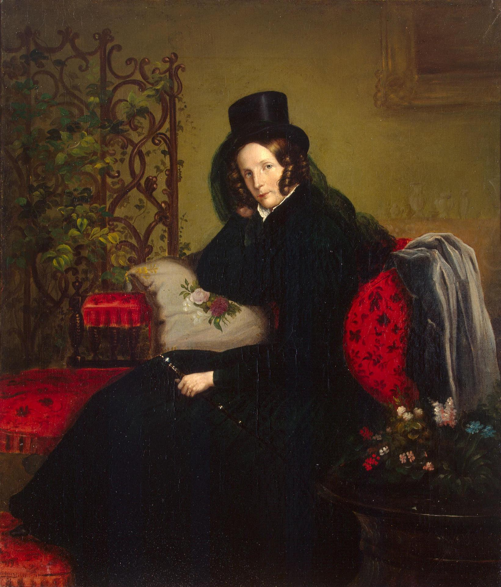 Nach einem Spazierritt (Porträt der Friederike Luise Charlotte Wilhelmine, Tochter Friedrich Wilhelm III.)